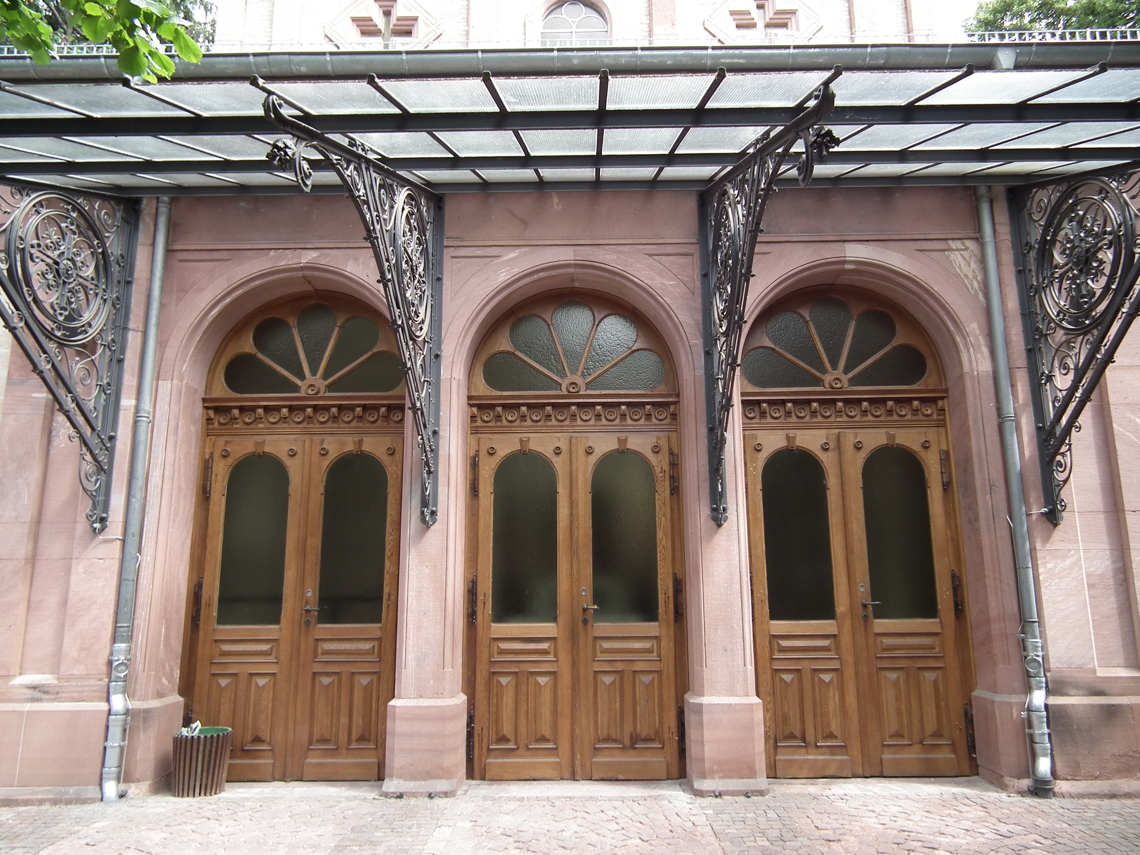 Haupteingang der Kapelle auf dem Bergfriedhof in Heidelberg (Baden-Württemberg, Deutschland), errichtet nach den Plänen des Stadtbaumeisters Jakob Julius Greiff